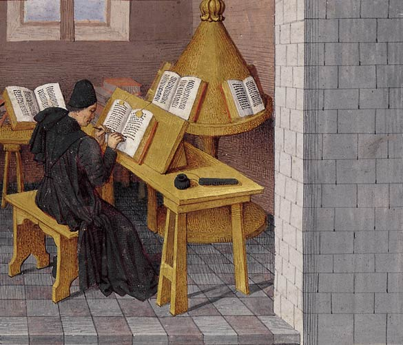 BnF Manuscrit Français 273-74 - Tite-Live de Versailles Fol 7 Tite-Live ou son traducteur écrivant